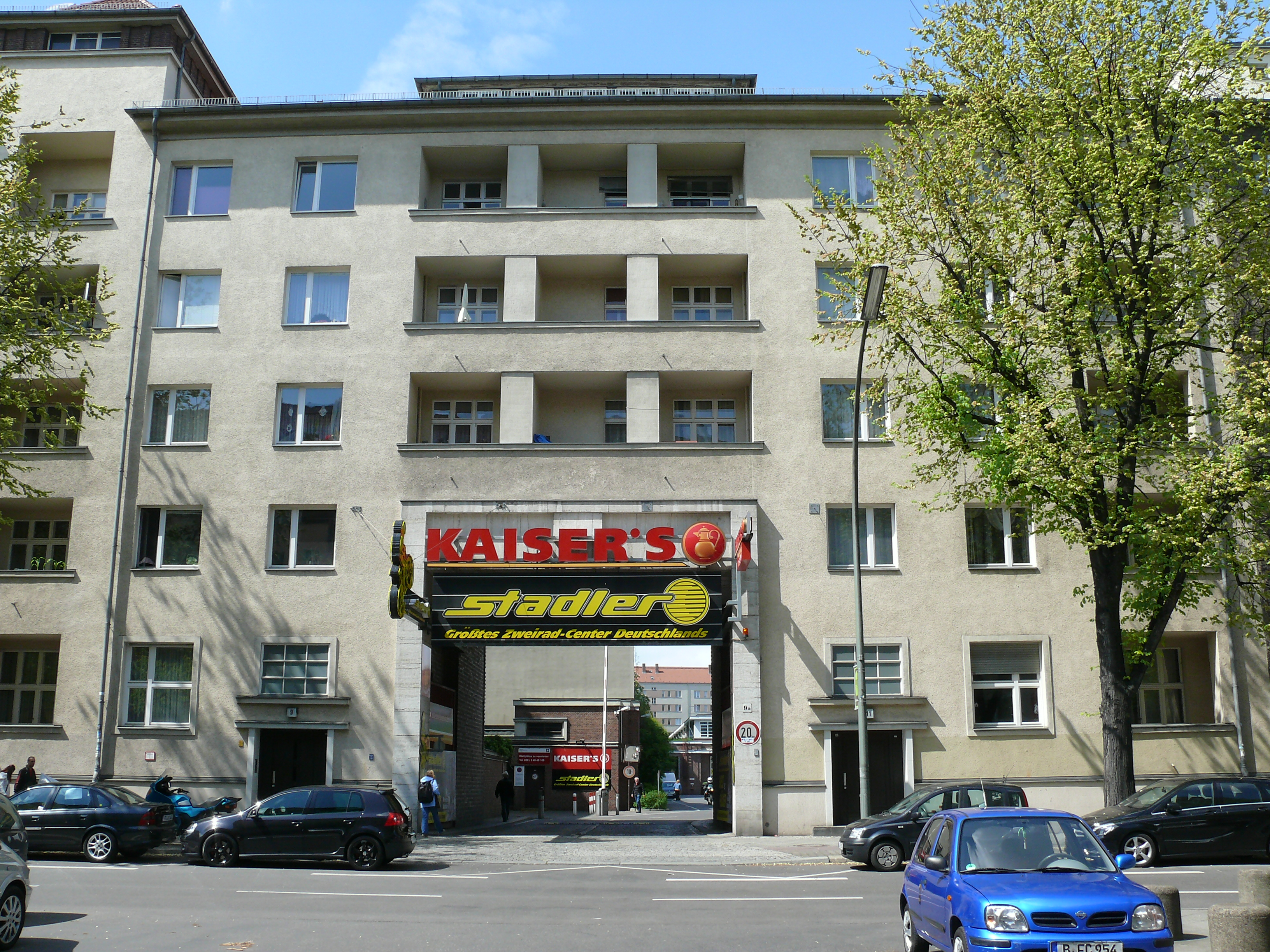 Berlin-Westend Königin-Elisabeth-Straße Betriebshof